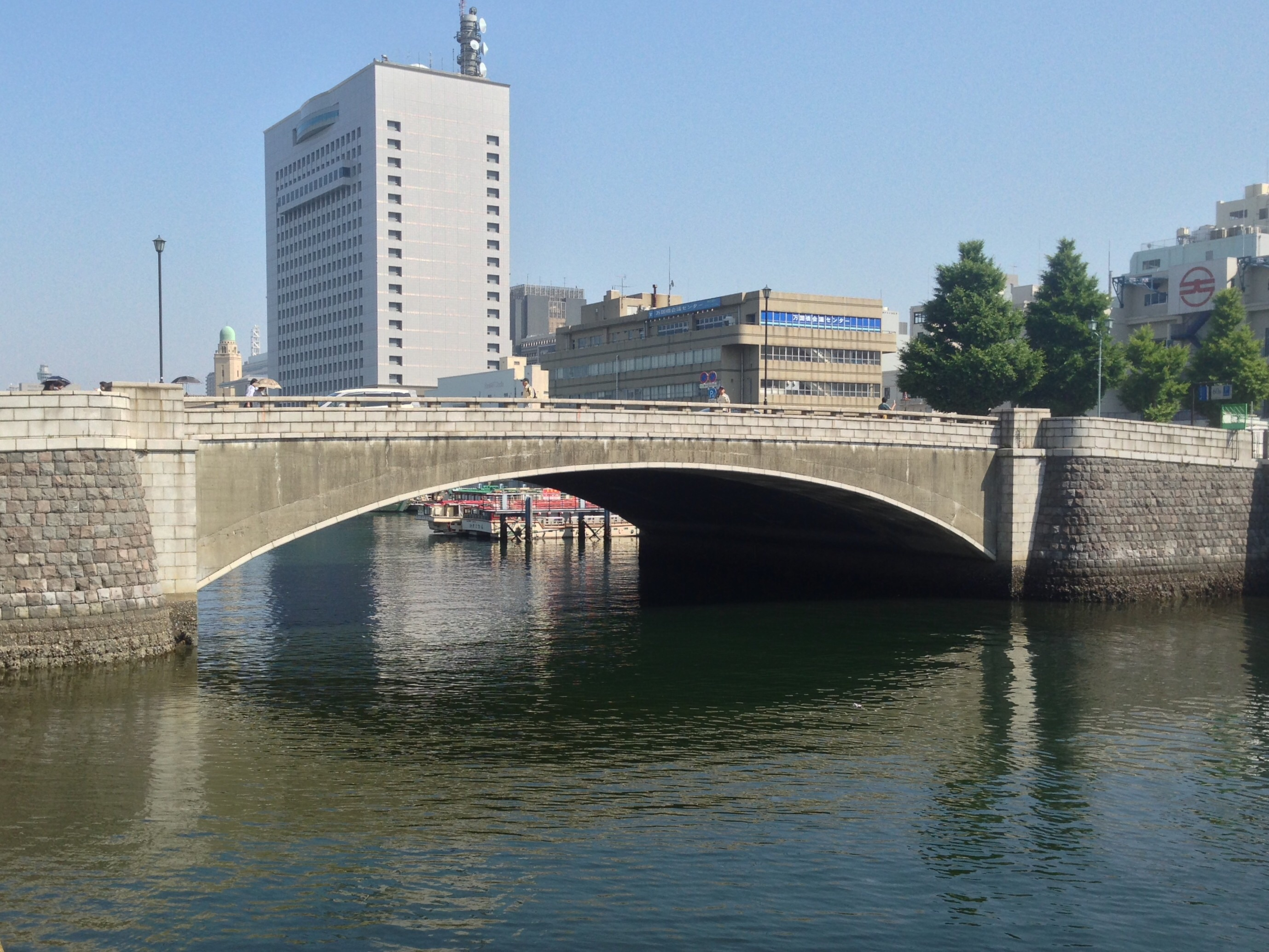 横浜の運河に架かる万国橋。